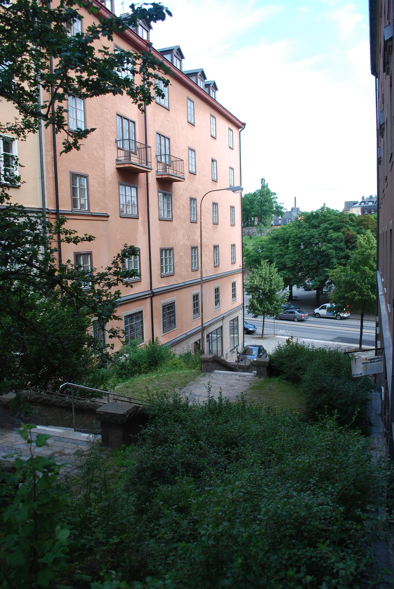 Hammargatan sedd från Eriksbergsgatan i Stockholm